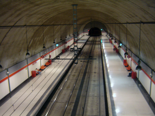 Estación de Valdelasfuentes de Cercanías Madrid por dentro. Alcobendas, Comunidad de Madrid. 6 de Noviembre de 2006.